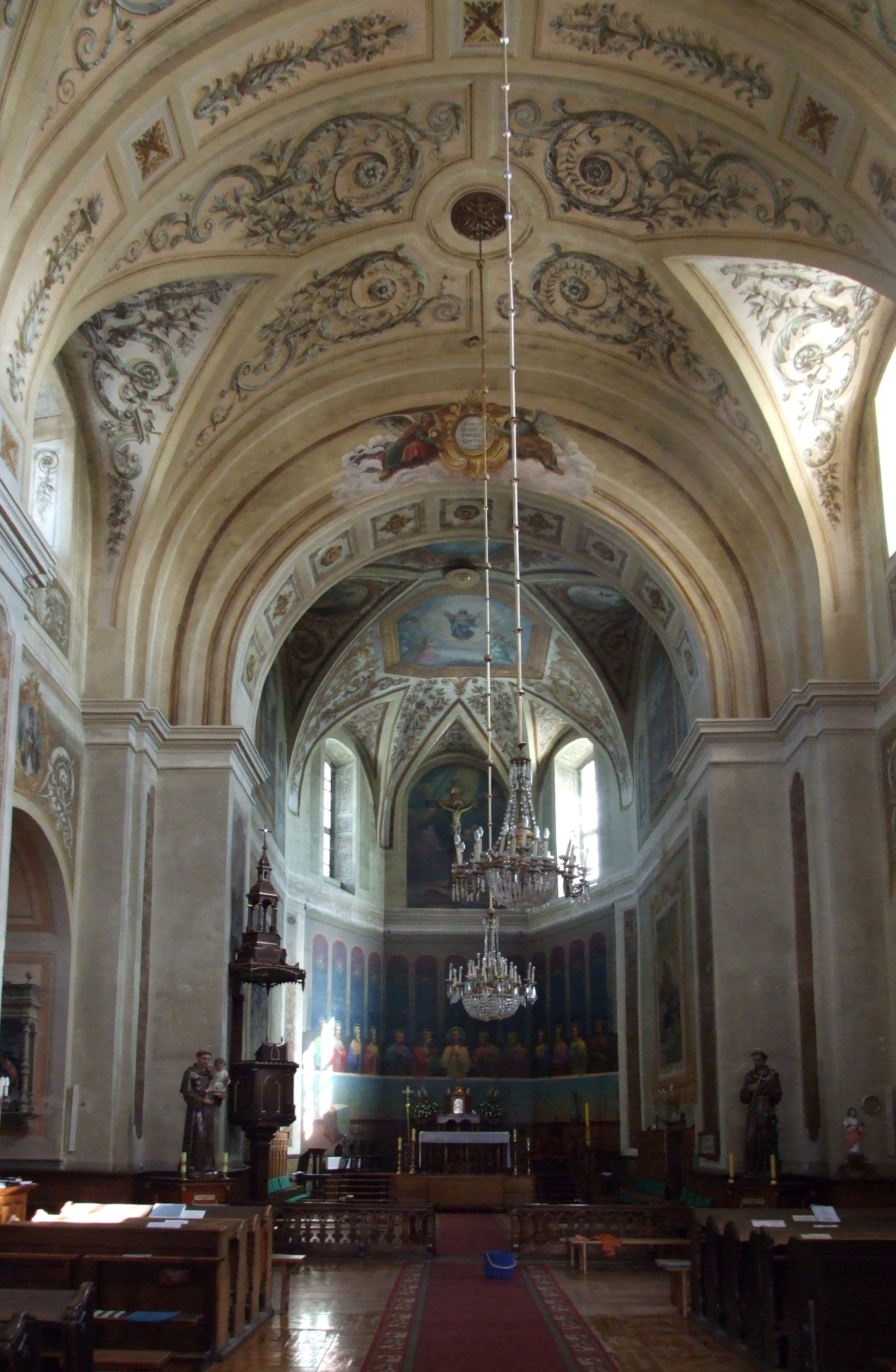 Szarogród - kościół rzymskokatolicki pw. Świętego Floriana